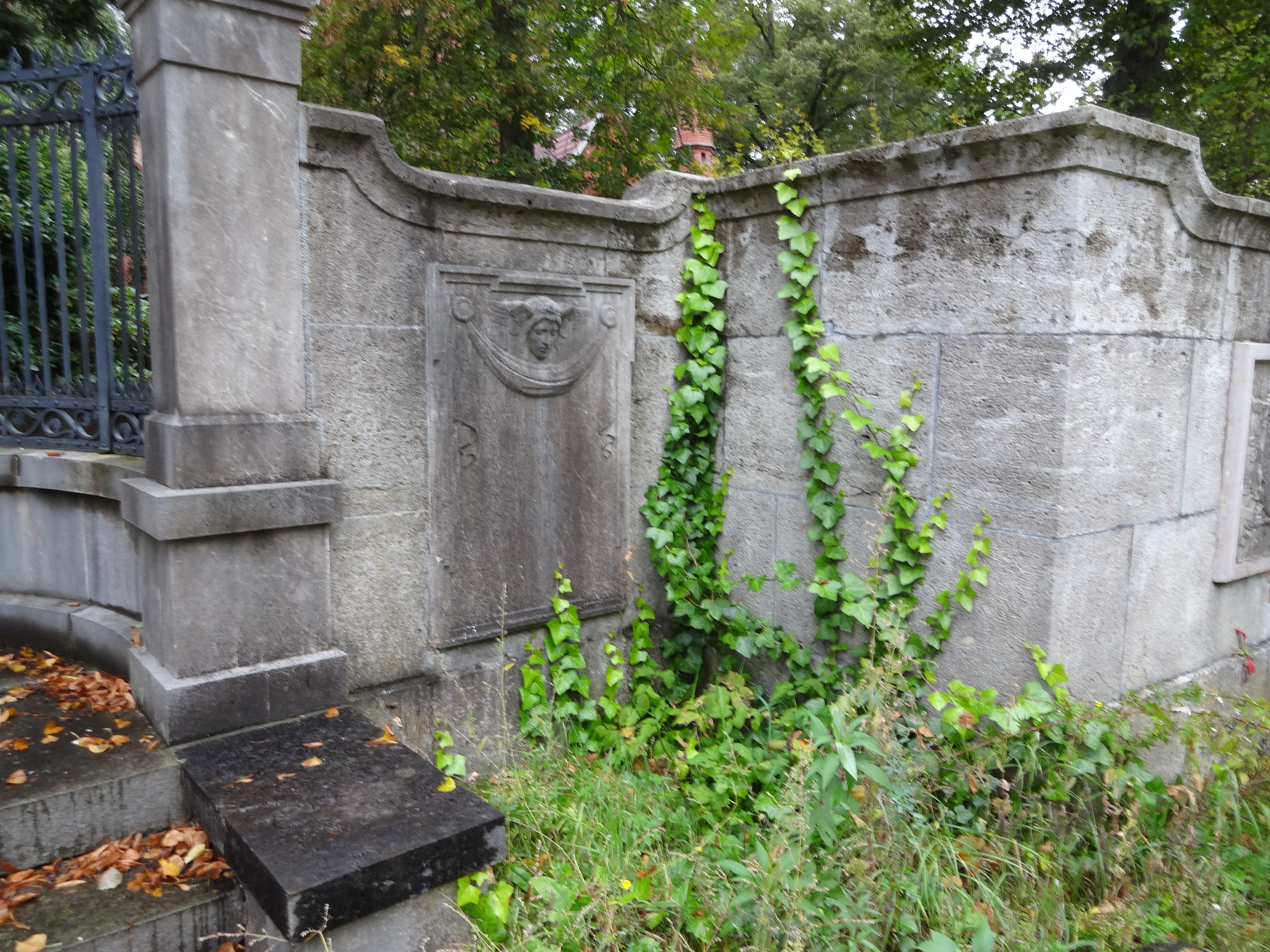 Grab von Anna von Helmholtz auf dem Friedhof Wannsee, Lindenstraße